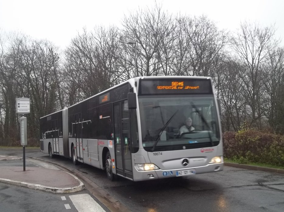 Mercedes - Benz Citaro G Facelift en nouvelle livrée Veolia Transport sur la ligne DO - Combs roule à vive allure en provenance de la Gare de Combs-la-Ville